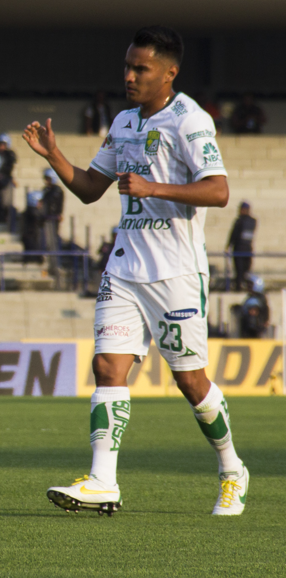 Pumas vs León